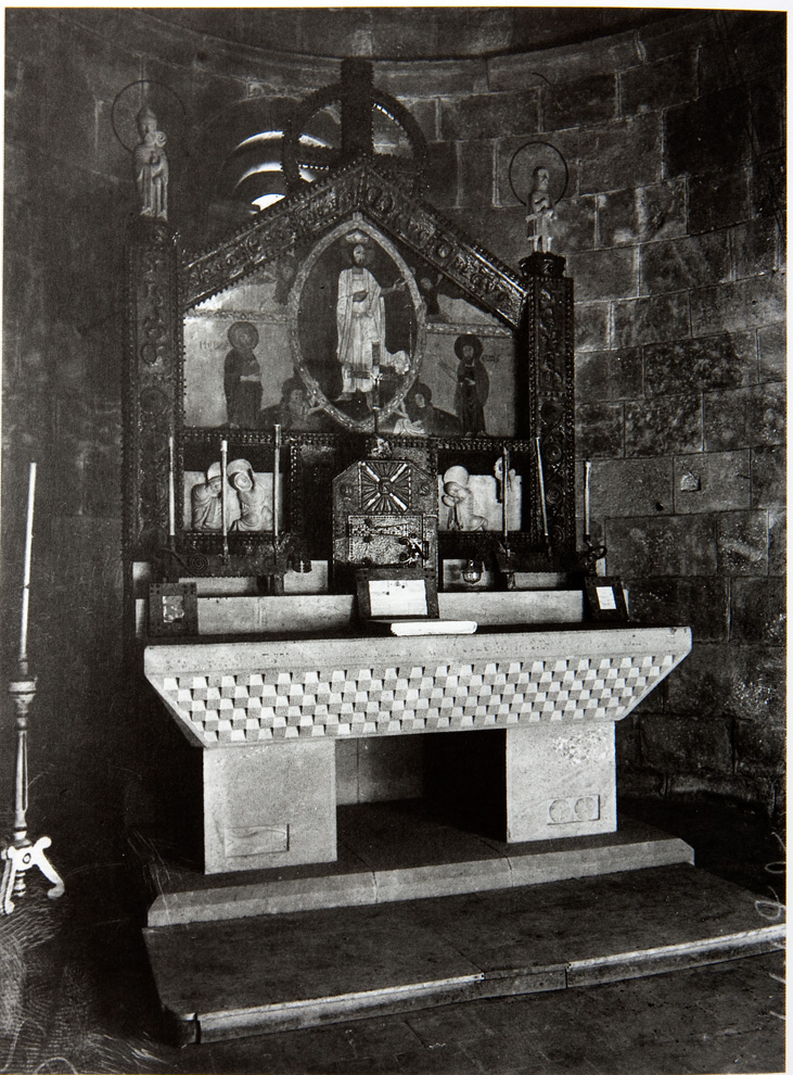 Restauració i construcció d'un altar i retaule